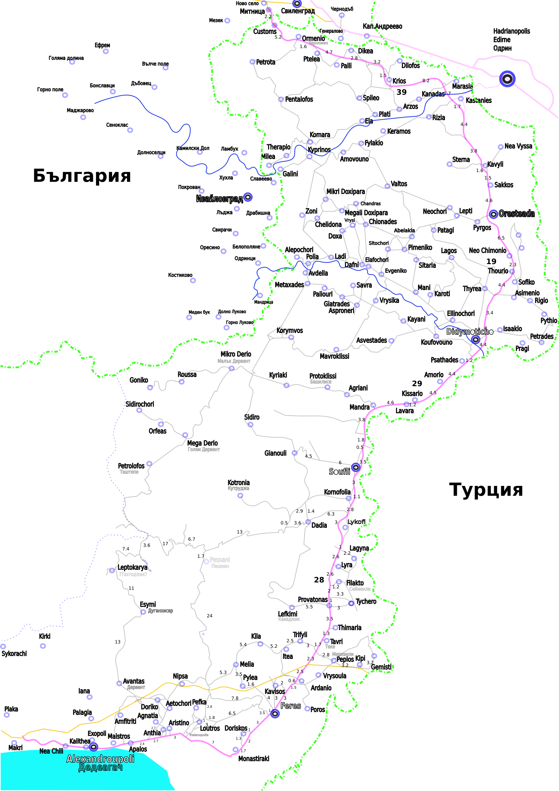 Ном Еврос